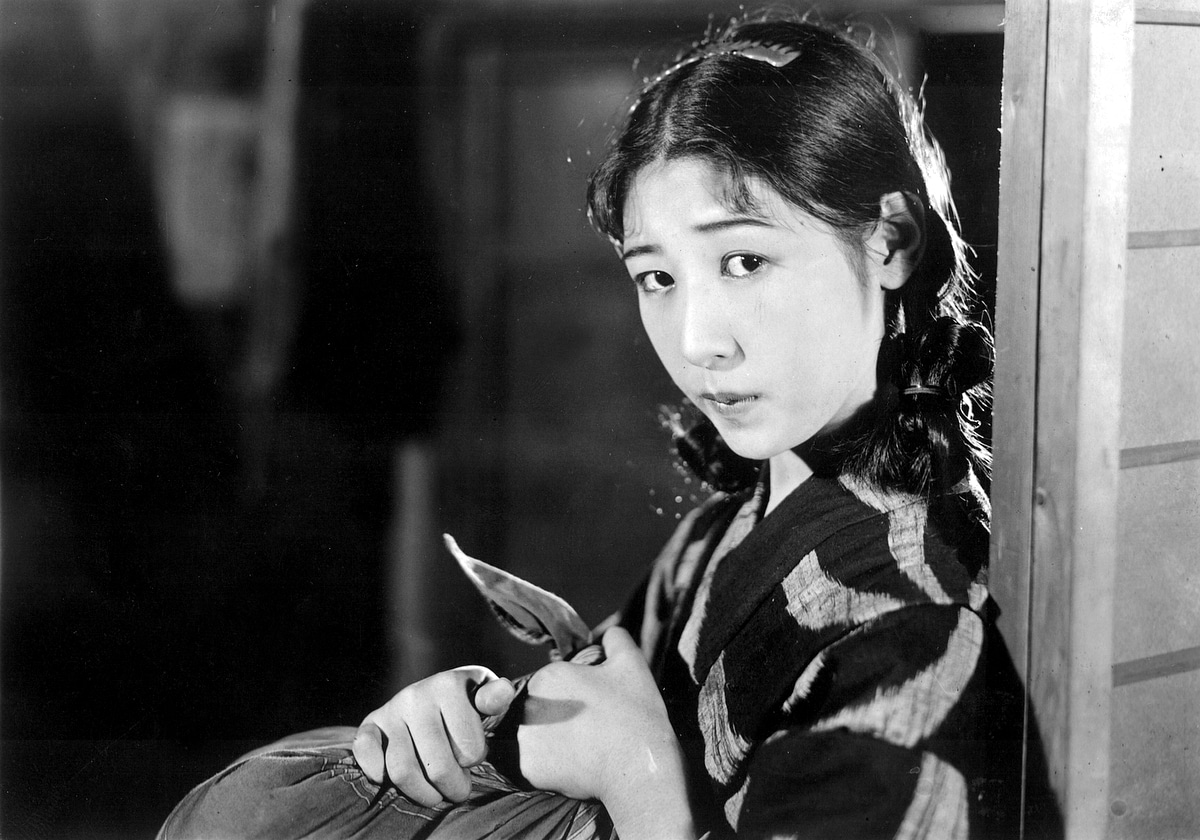 Keiko Takatsu in What Made Her Do It? (Nani ga kanojo o sōsaseta ka 何が彼女をそうさせたか) (1930) directed by Shigeyoshi Suzuki